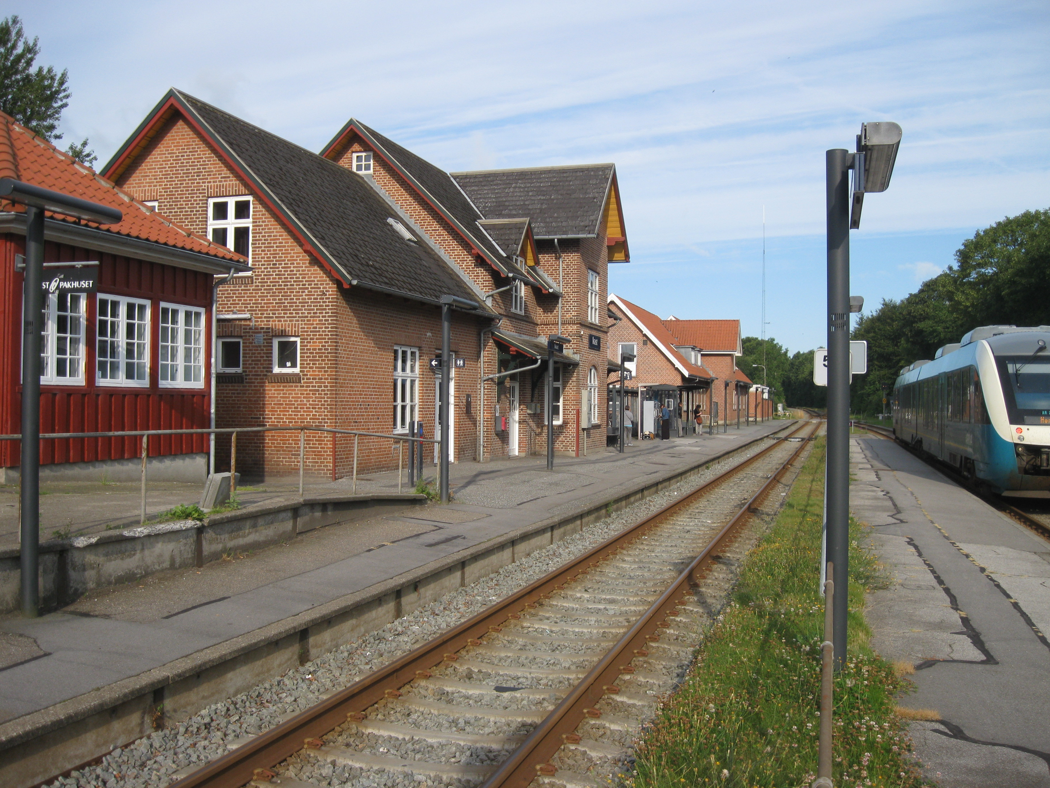 Ikast Station